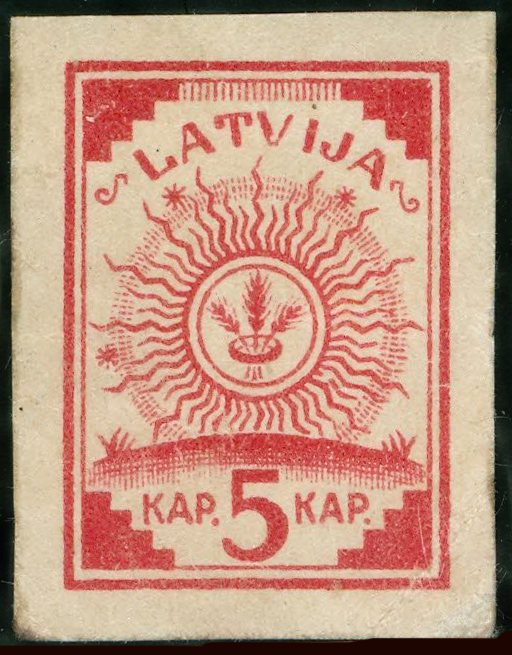 Первая почтовая марка Латвии. Выполнена по эскизу художника Ансиса Цирулиса